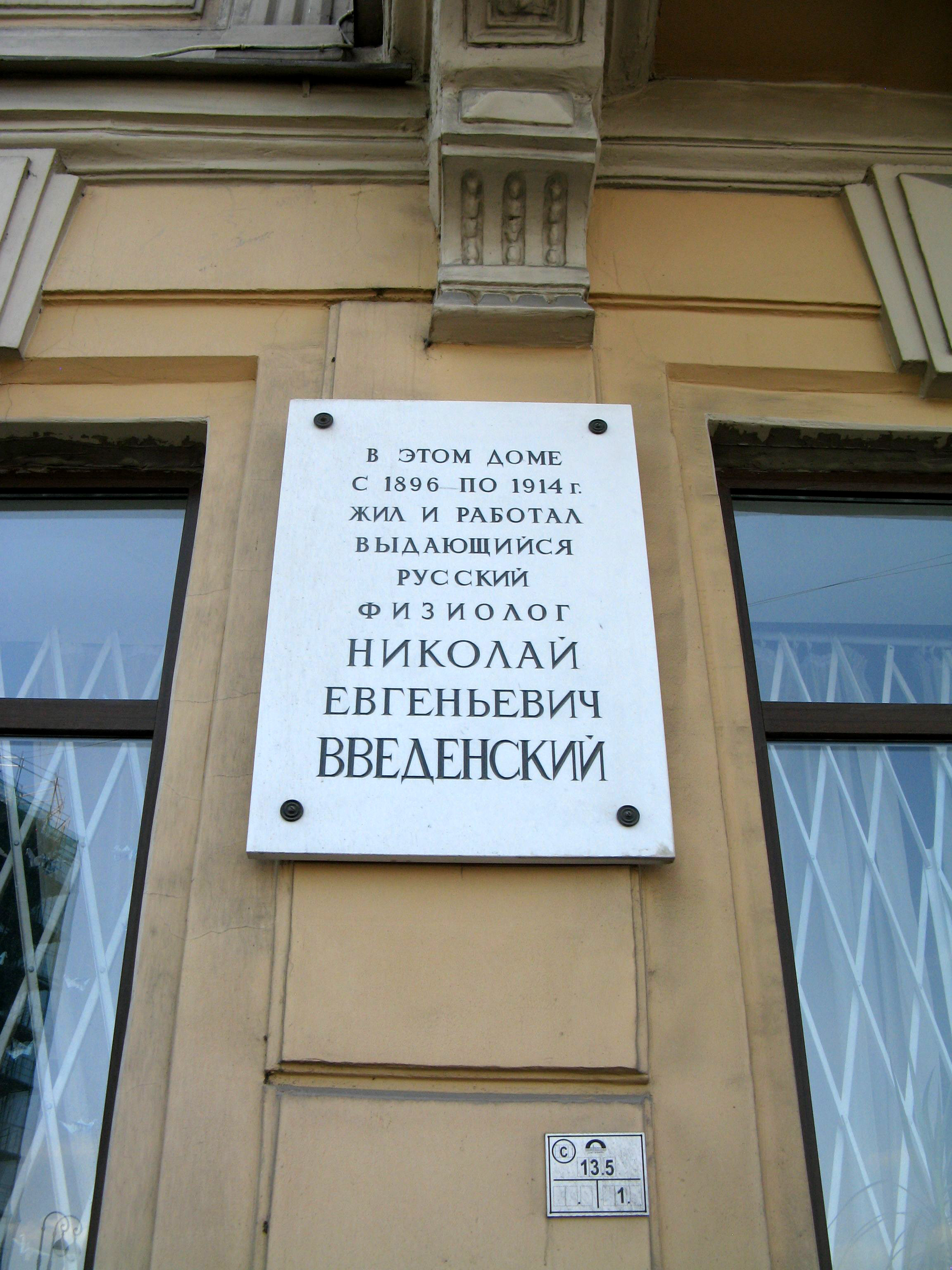 Мемориальная доска физиологу Н. Е. Введенскому в Санкт-Петербурге (Волховский пер., д. № 2)